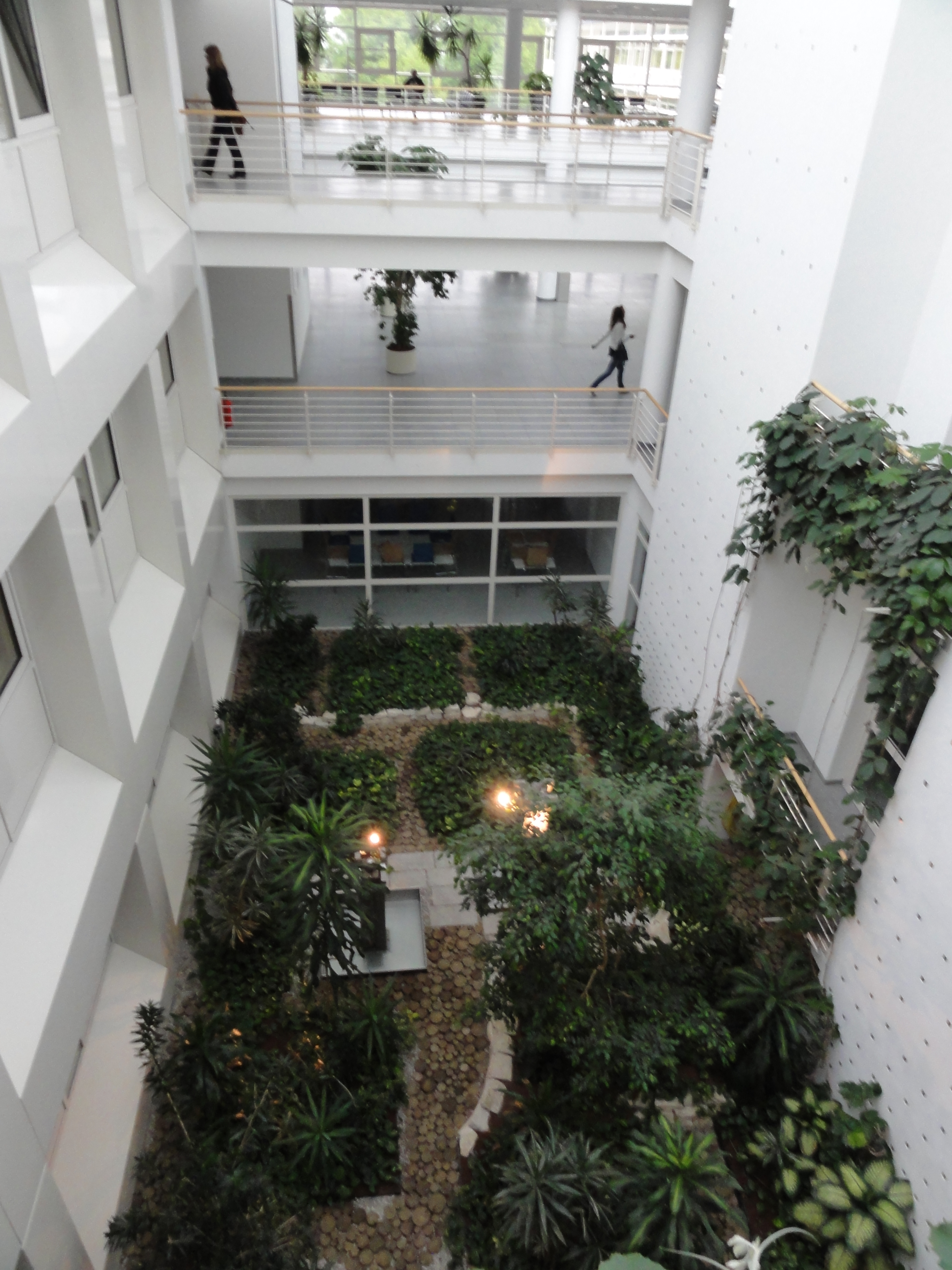 Murnau am Staffelsee, Germany